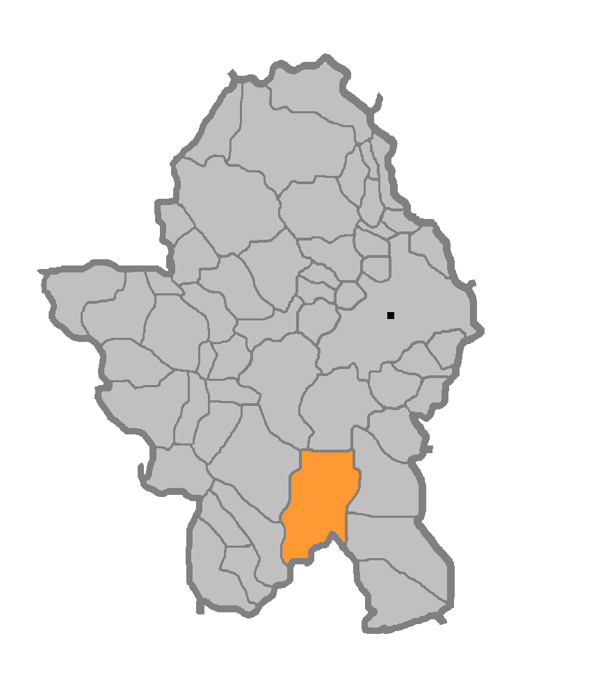 Мјесна заједница Крупа на Врбасу